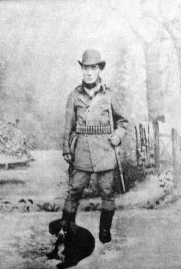 a Japanese man 徳川慶喜 (Yoshinobu Tokugawa)